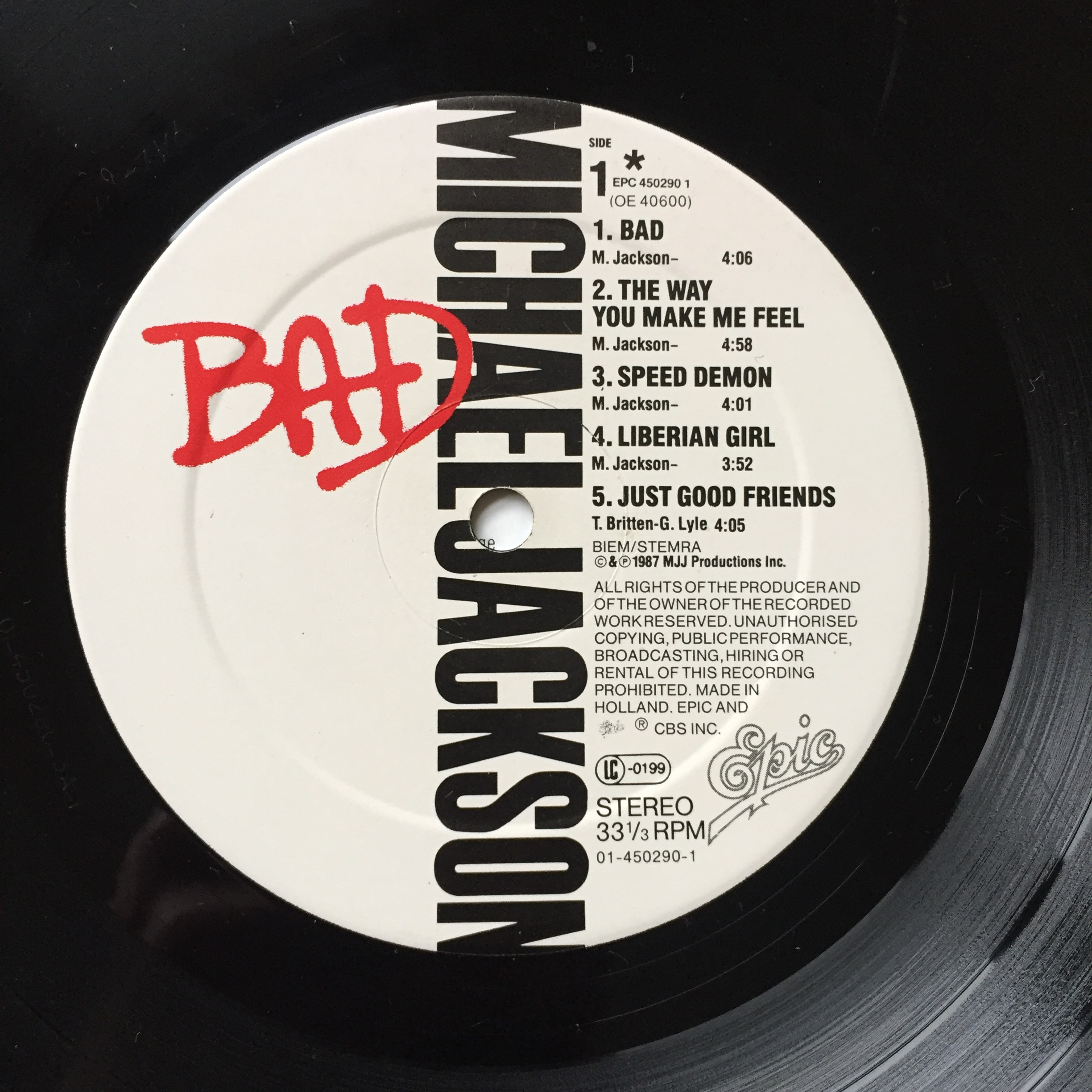 Label des Albums "Bad!" von Michael Jackson